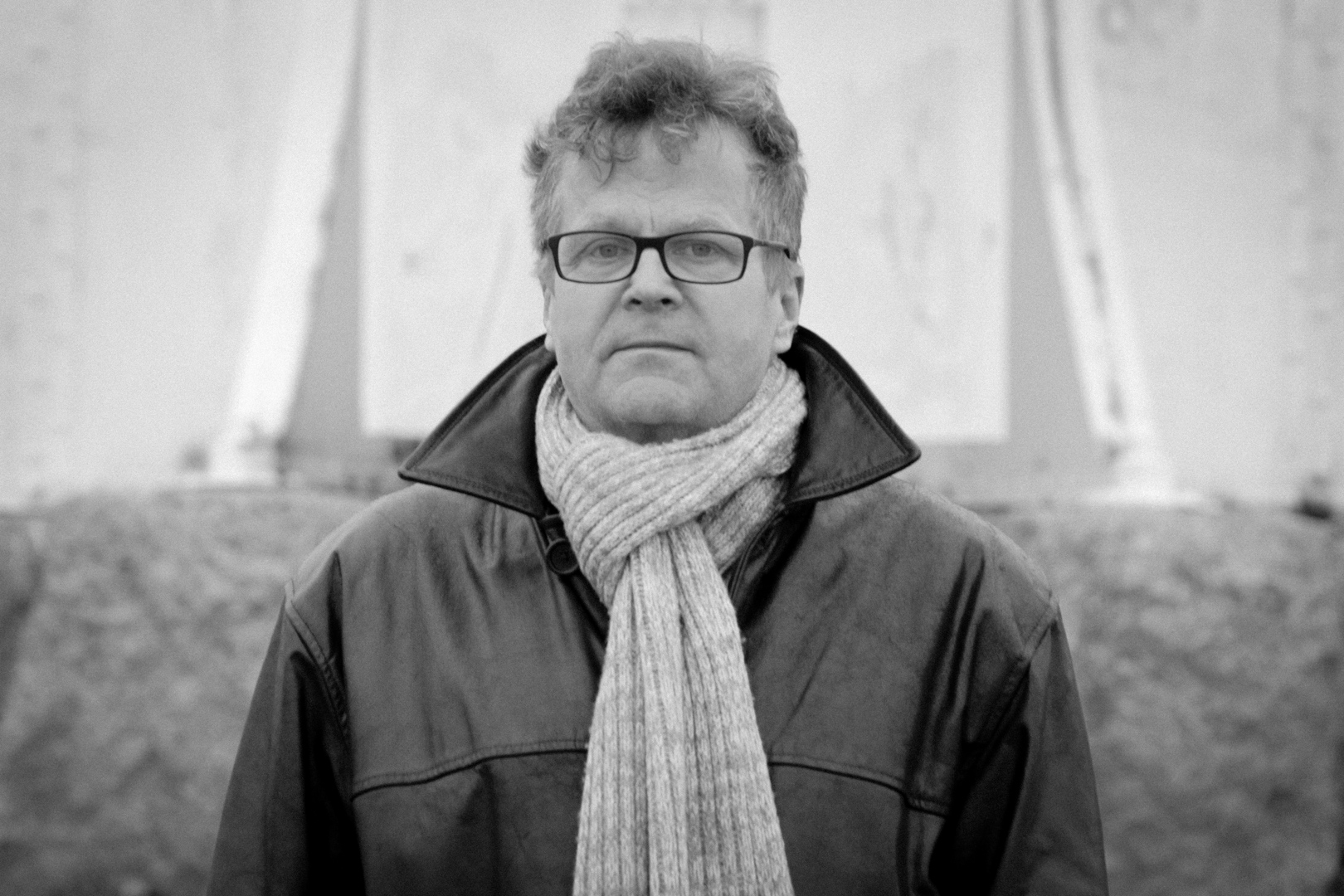 Kirjailija Pertti Koskinen